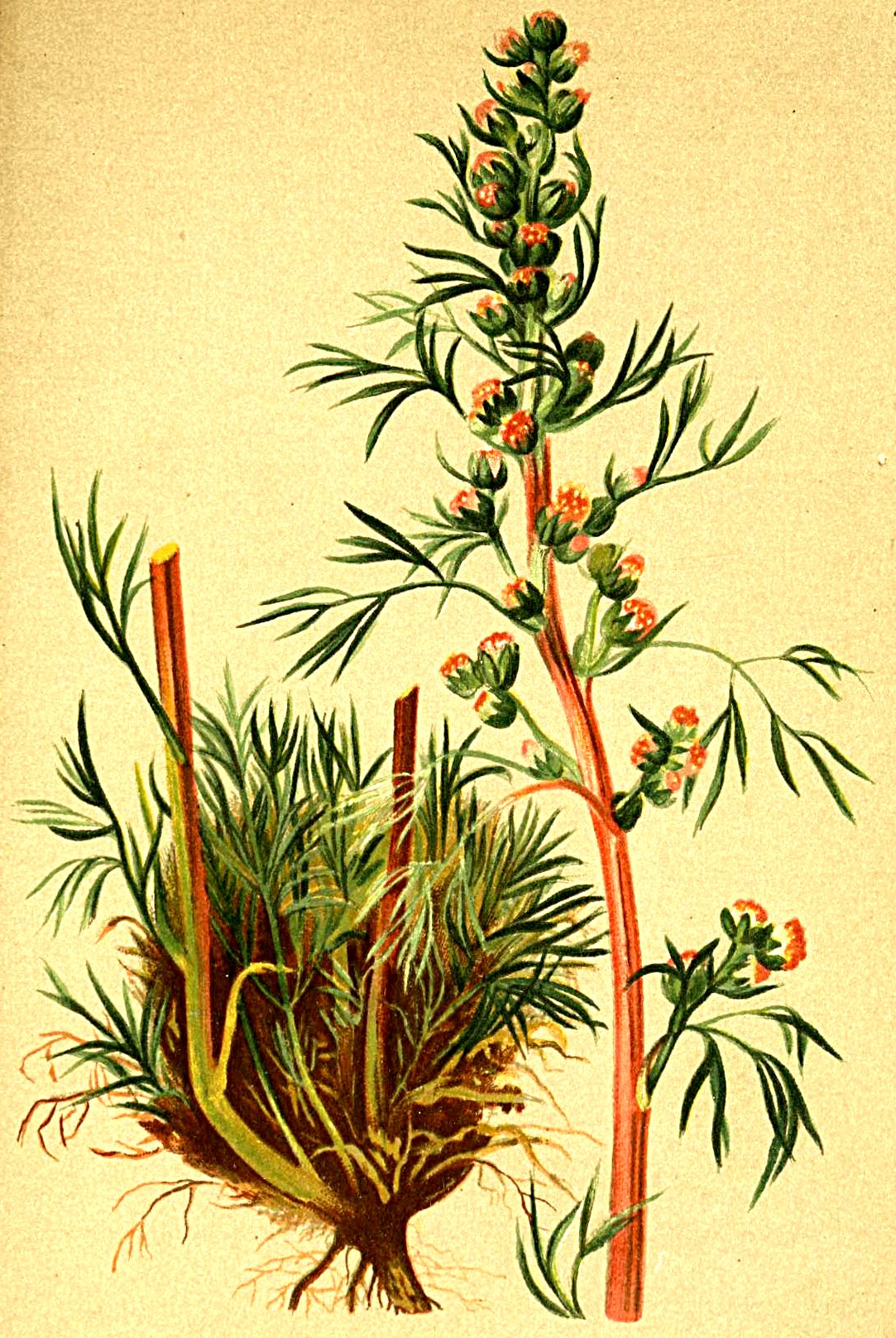 Artemisia nana (Artemisia campestris)